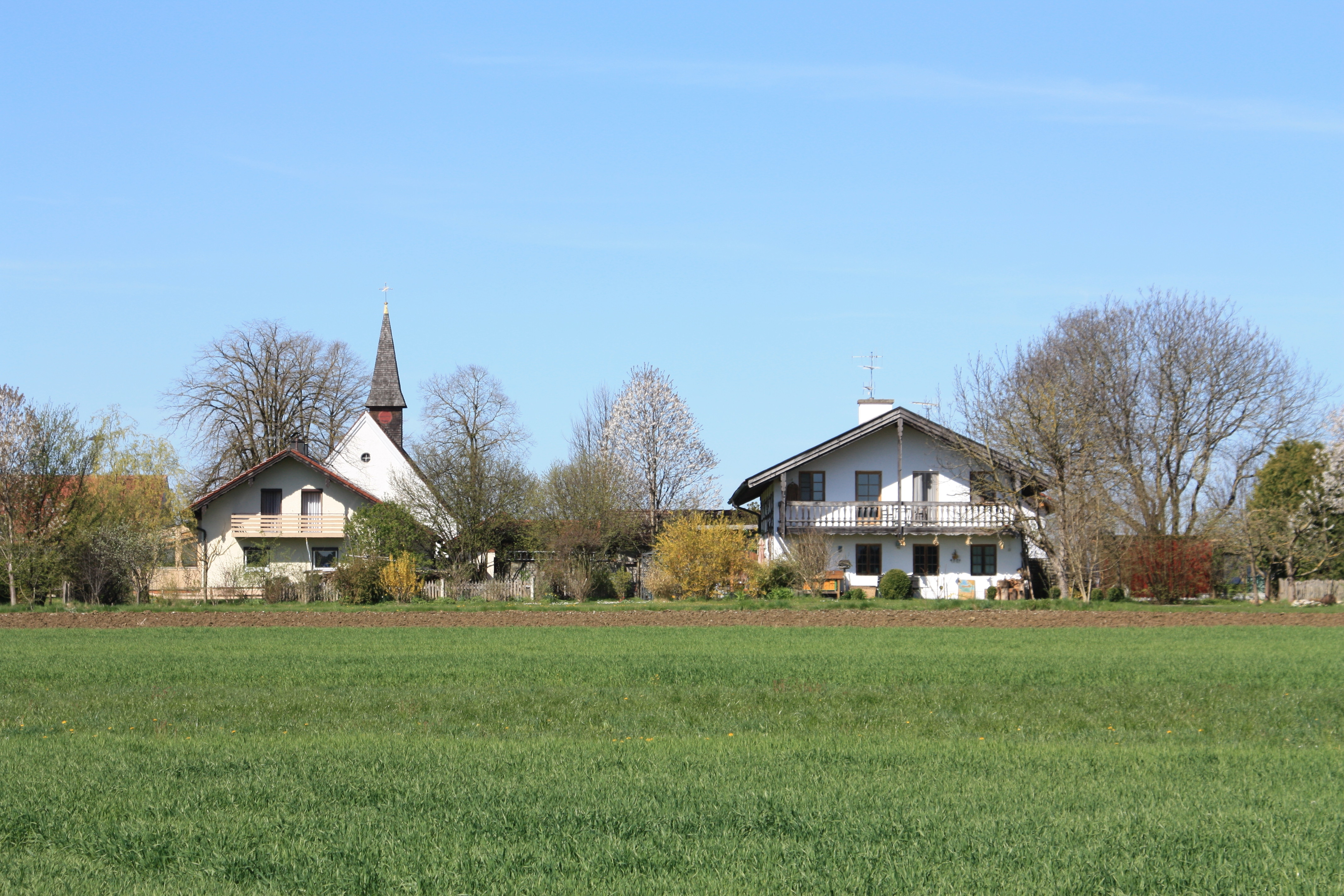 Schnaitsee OT Harpfing